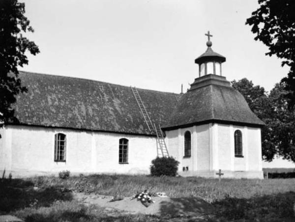 Teda kyrka, Teda socken, Uppland